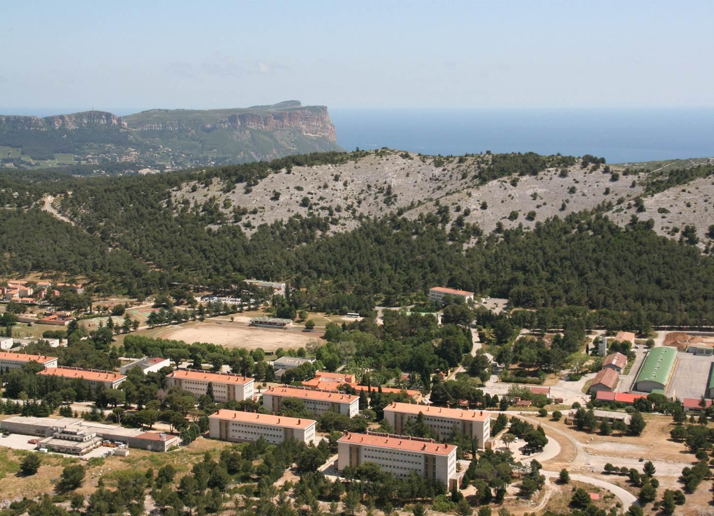 Camp de Carpiagne aujourd'hui